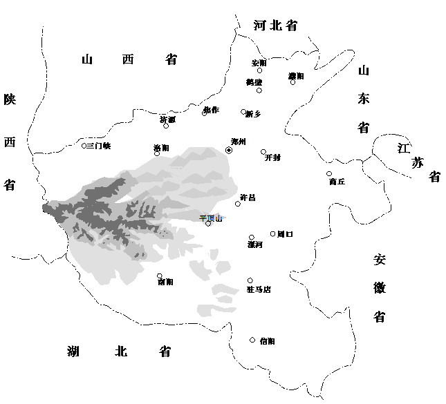 中文（中国大陆）: 伏牛山区域图